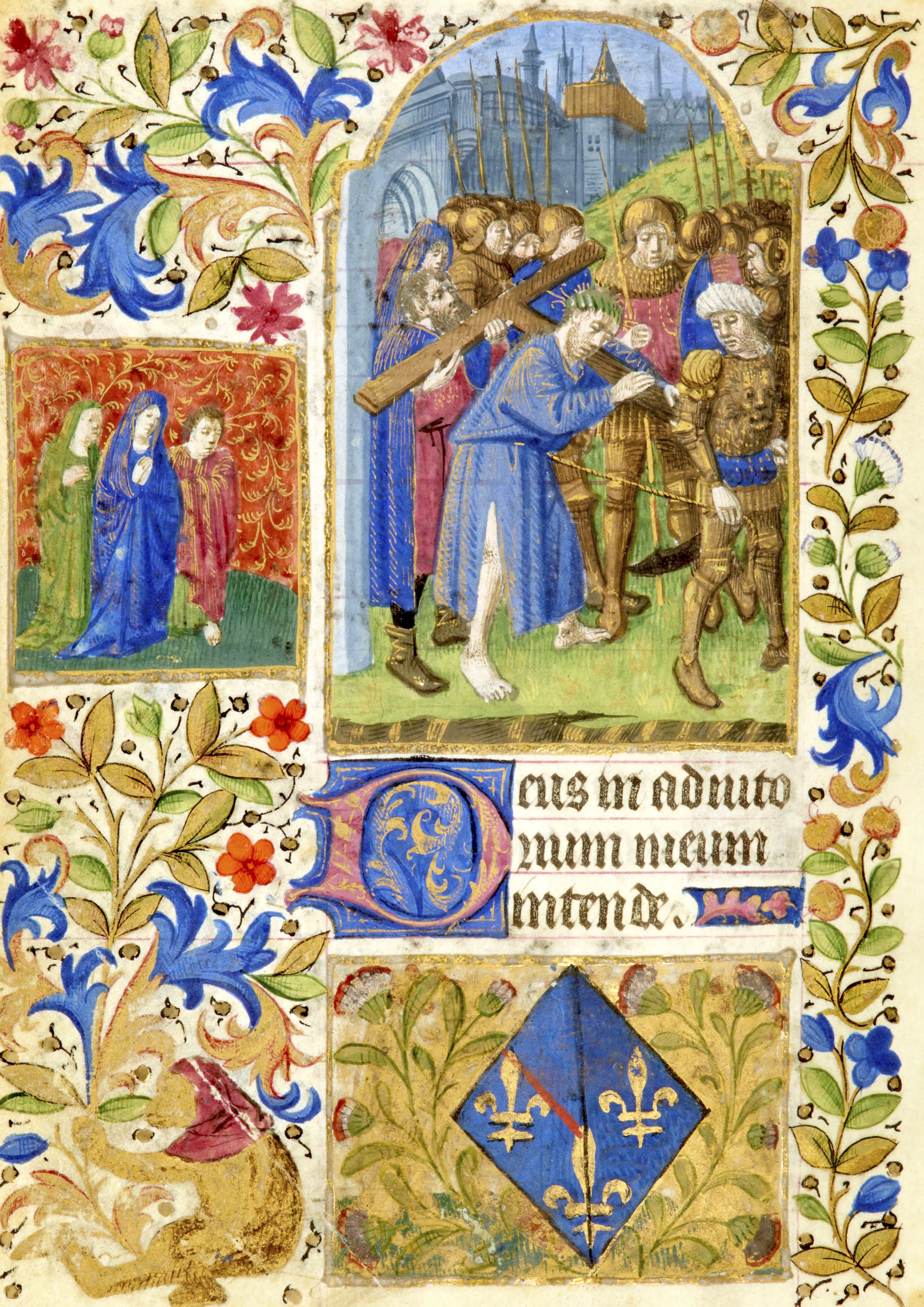 Heures de Jeanne de France BnF NAL 3244 f256v - Portement de croix